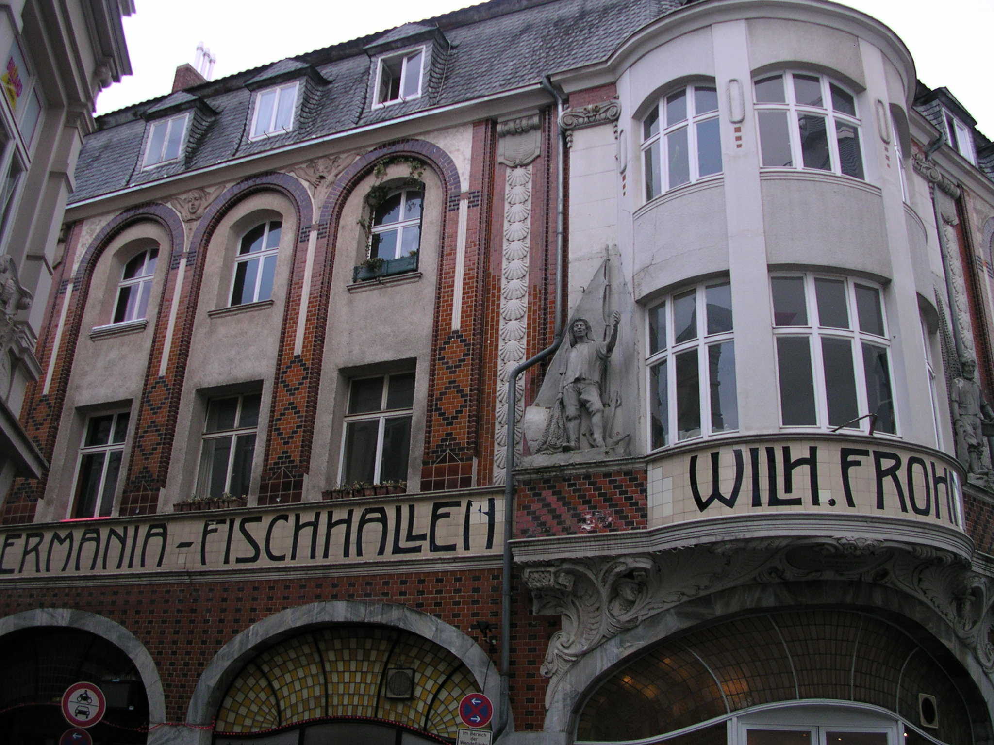 Aachen, Germania-Fischhallen Wilhelm Frohn an der Mefferdatisstraße, Ecke Antoniusstraße. Der Besitzer wurde von einem Mieter ermordet, danach war das Gebäude verschieden genutzt, z.B. als Peepshow.